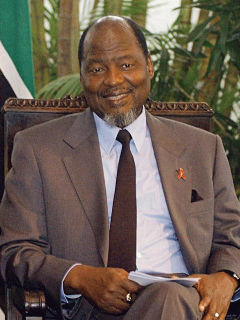 O presidente de Moçambique Joaquim Chissano.